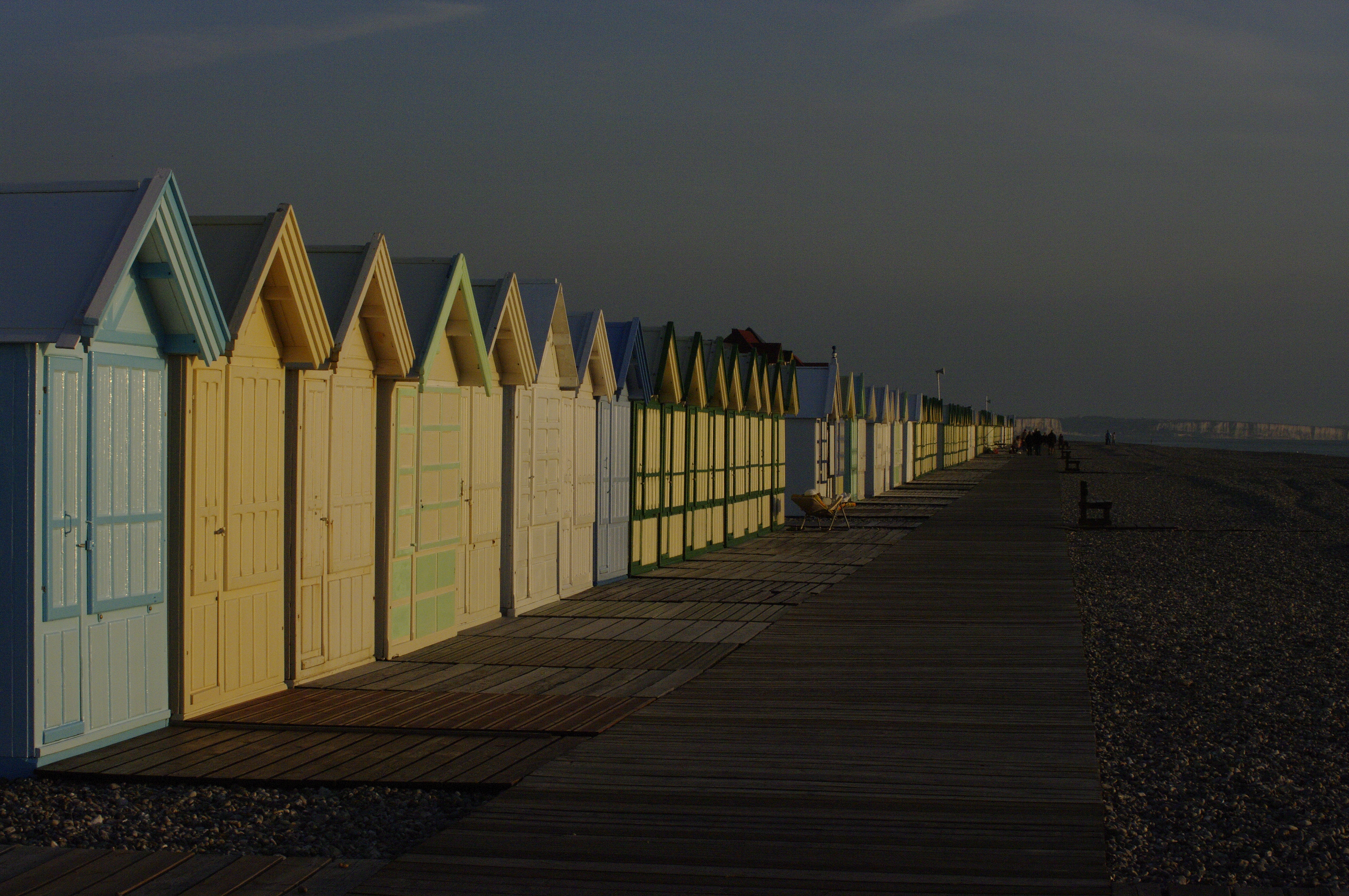 Les cabines colorées de bord de mer le long du chemin de planches à Cayeux-sur-Mer.